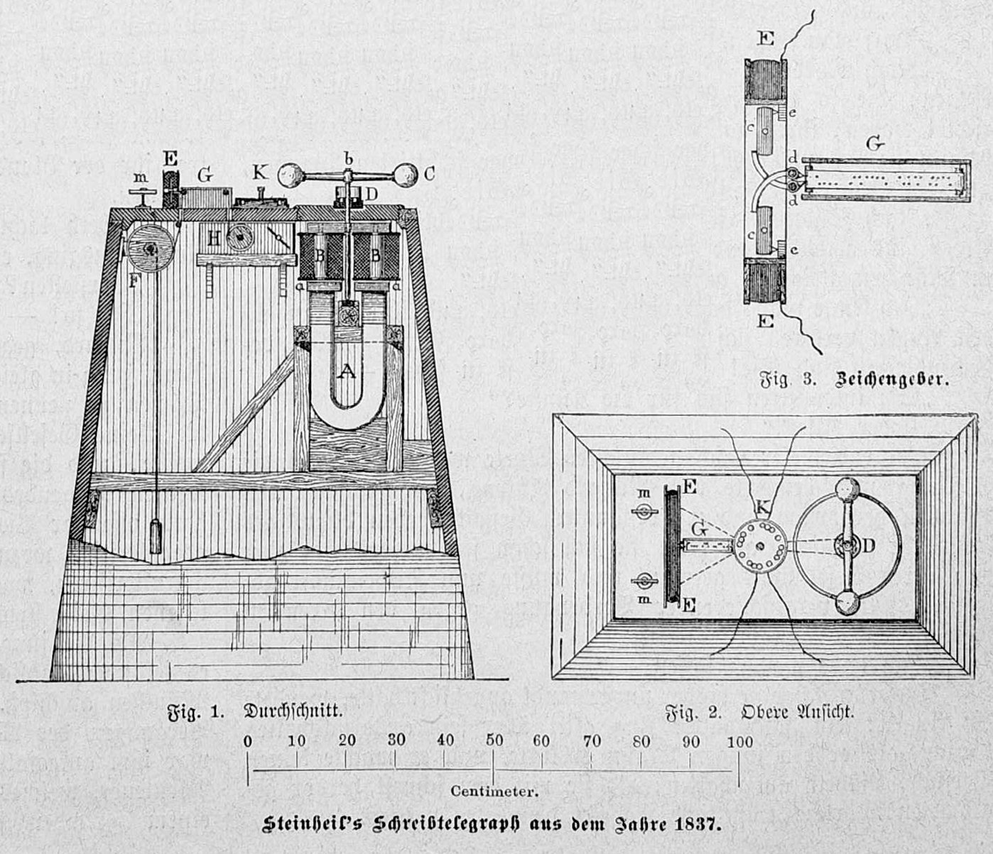 Bild aus Seite 605 in "Die Gartenlaube". Image from page 605 of journal Die Gartenlaube, 1887.